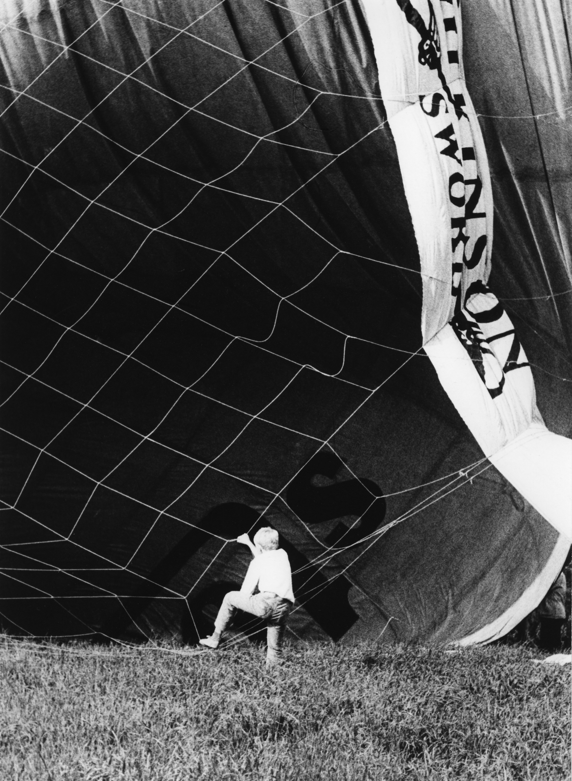 Snímek ze série "Pozor na balony!", která byla přijata na World Press Photo 1977 a byla celá otištěna v katalogu na dvou stránkách. Jako amatérovi mně tenkrát pomohl Antonín Bahenský ze Signálu, že jsem jejich spolupracovník. Název pro katalog byl v angličtině (Be awar of ballons!). Personality rights warningAlthough this work is freely licensed or in the public domain, the person(s) shown may have rights that legally restrict certain re-uses unless those depicted consent to such uses. In these cases, a model release or other evidence of consent could protect you from infringement claims.